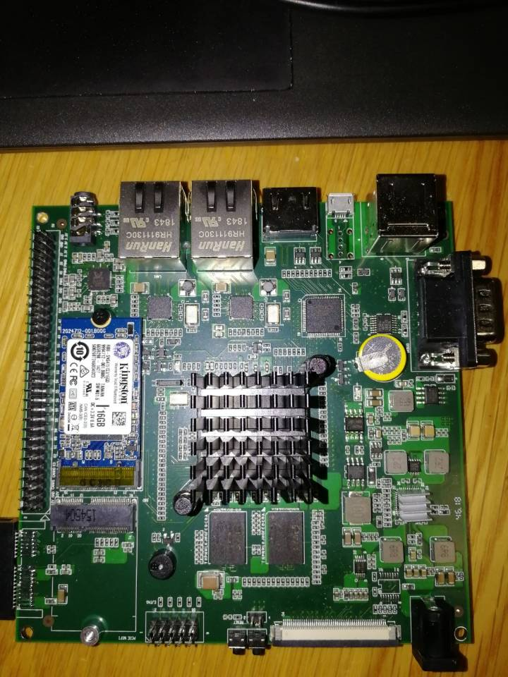 龙芯二代派正面照